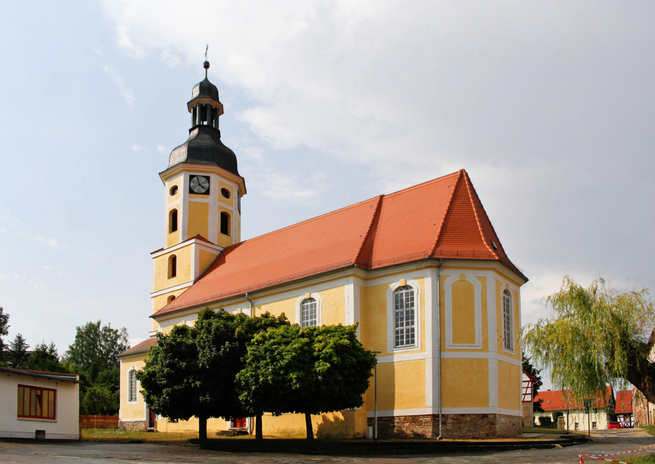 Kirche in Kayna, Zeitz, Burgenlandkreis, Sachsen-Anhalt, Deutschland